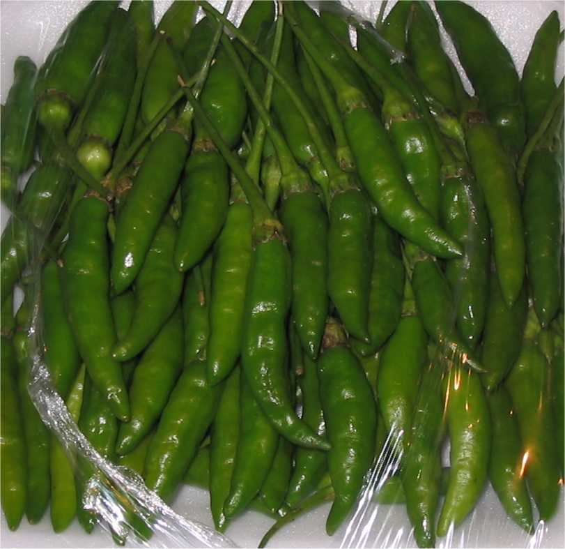 Grüner Bird Chili aus Thailand Fotograf: Oeschi Lizenz: GFDL